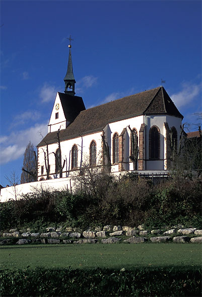 Kirche St. Chrischona (Bettingen), Schweiz